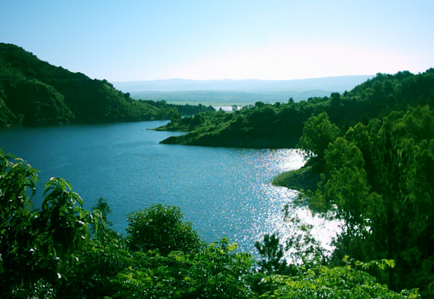 Lago en la región de Calamuchita, en la provincia argentina de Córdoba